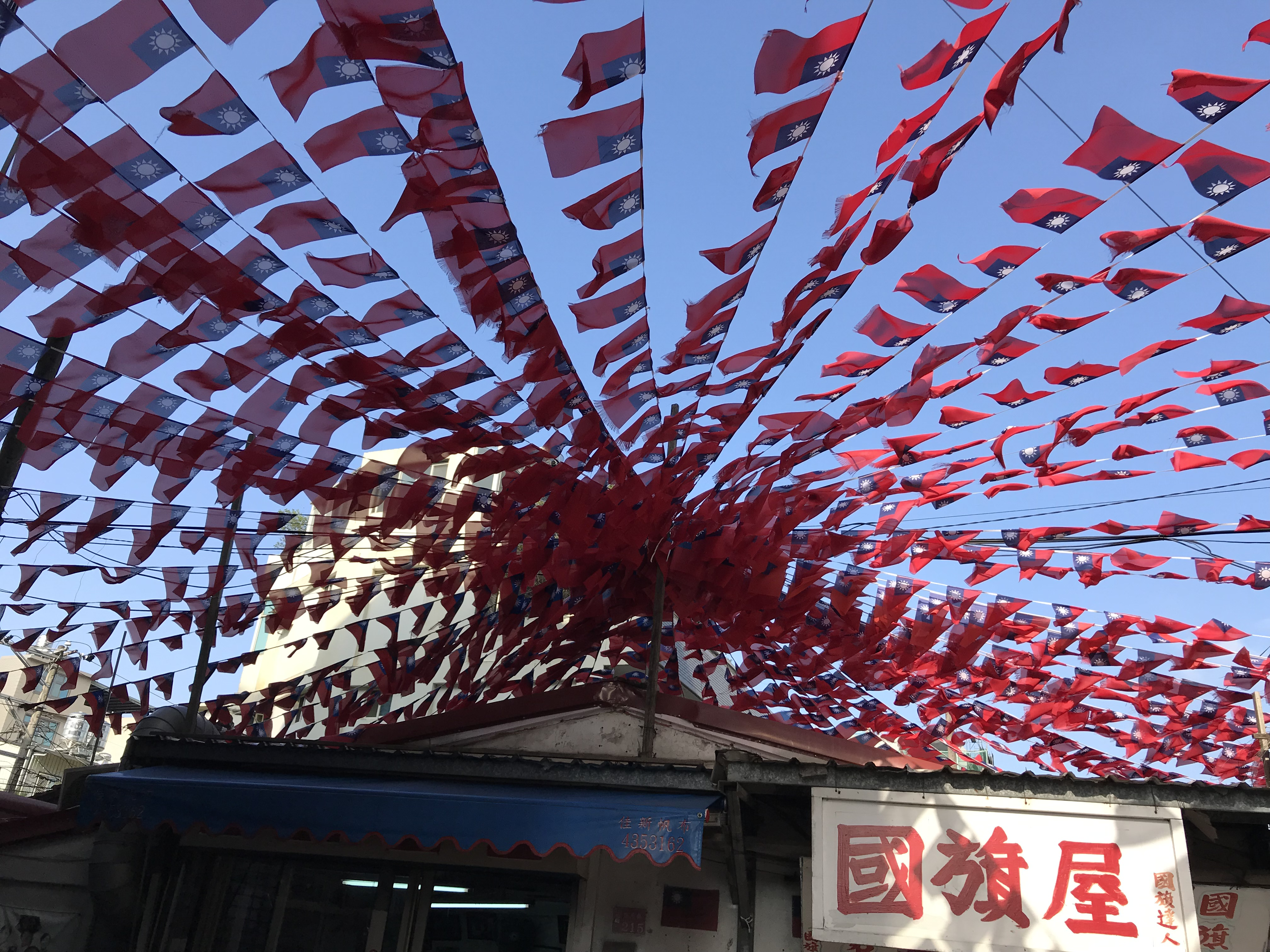 中文（台灣）: 國旗屋米干店屋頂旗海